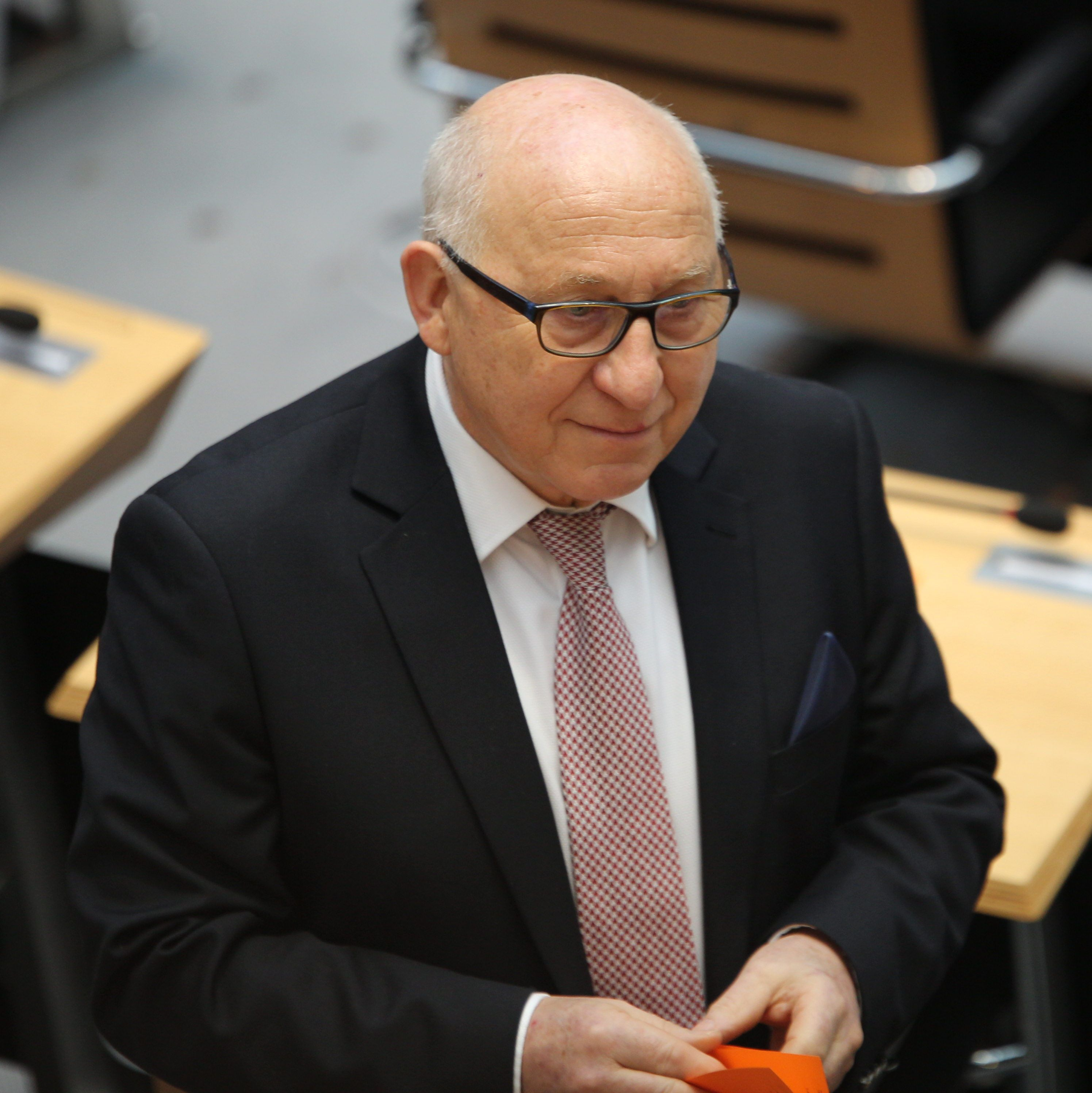 Kurt Wansner während der Plenarsitzung des Berliner Abgeordnetenhauses am 8. Dezember 2016